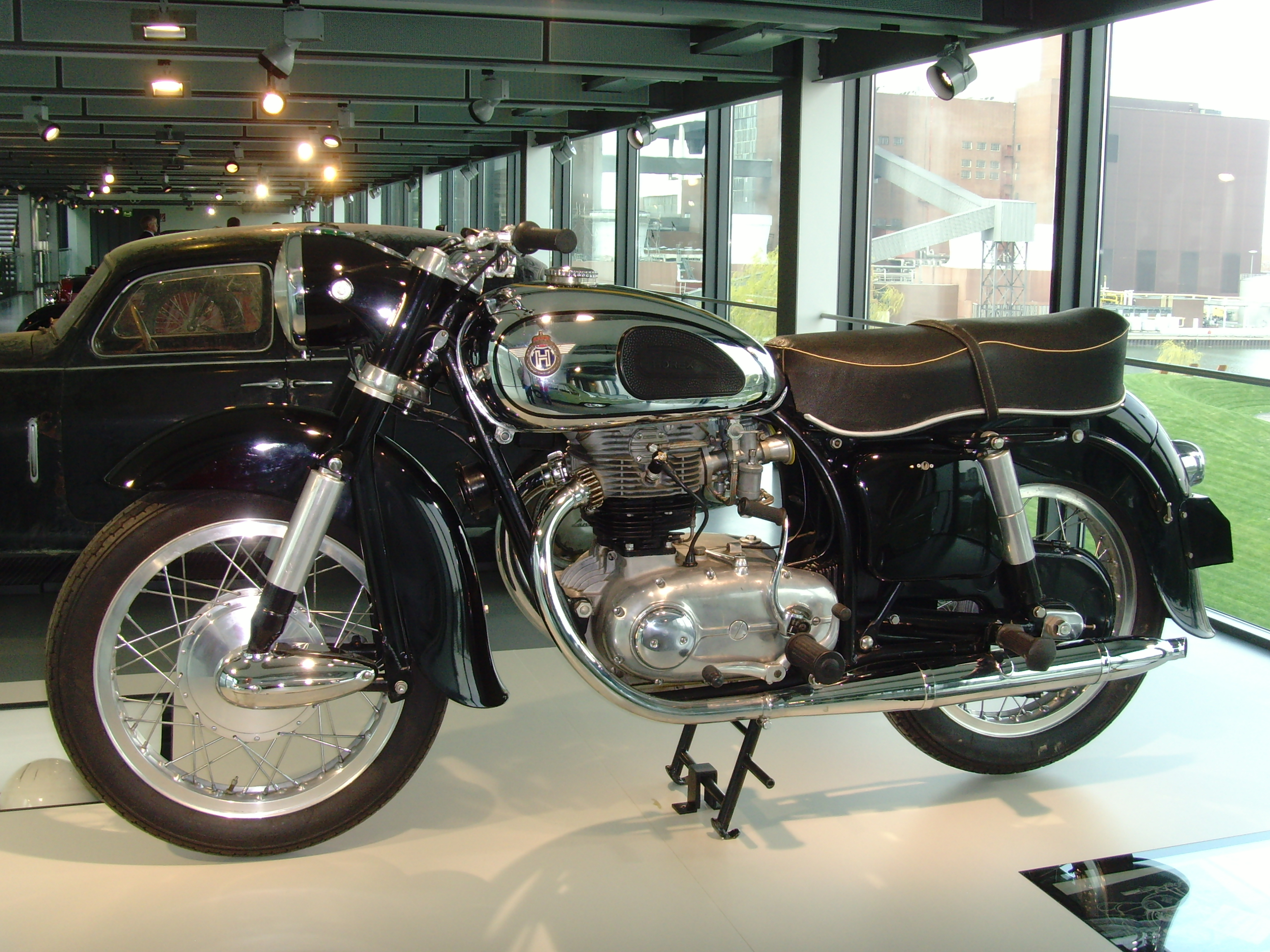 Autostadt Wolfsburg - motorrad ikonen - Horex Imperator 1955 1